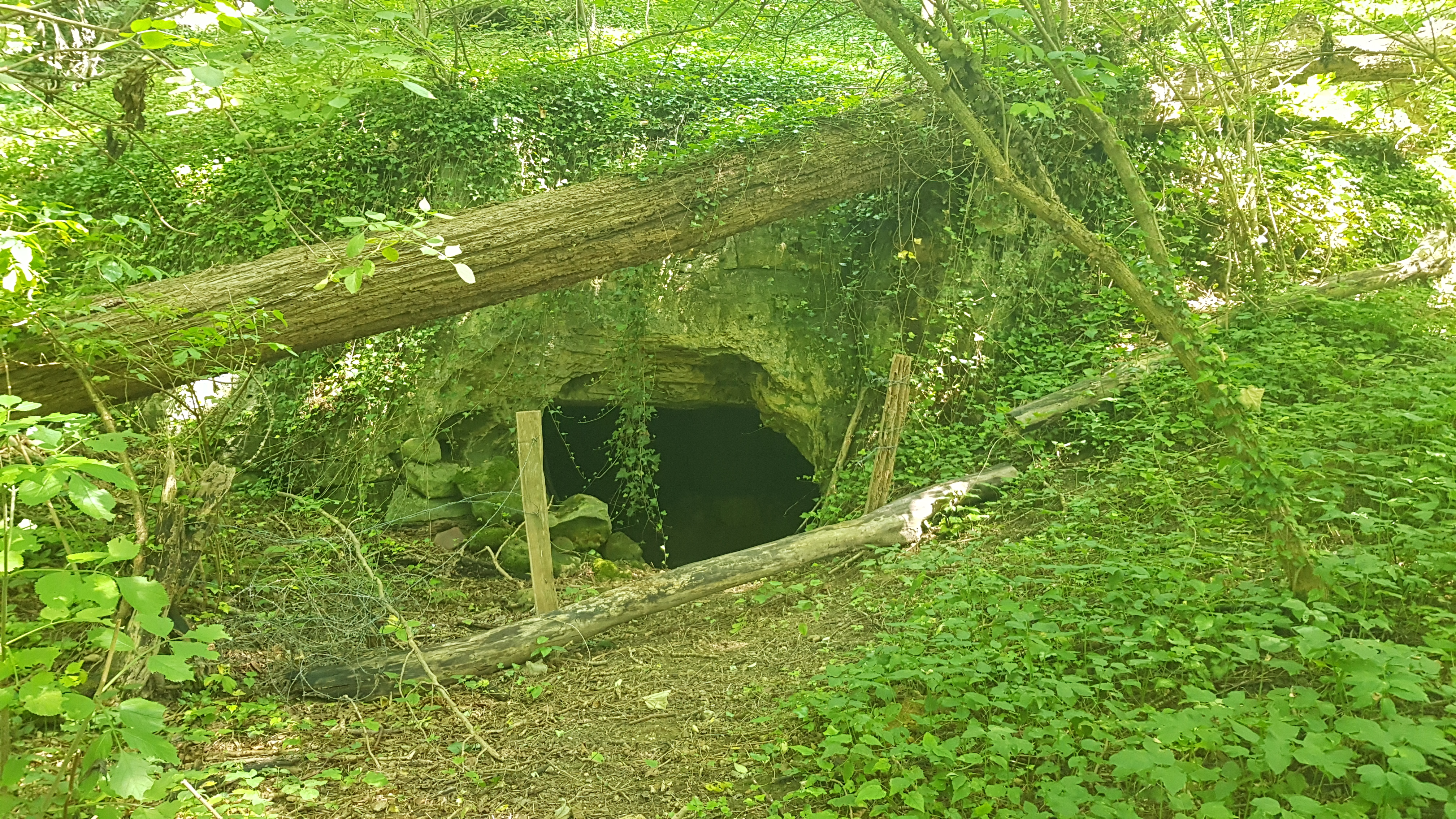 Canadasbergske, Valkenburg, Nederland